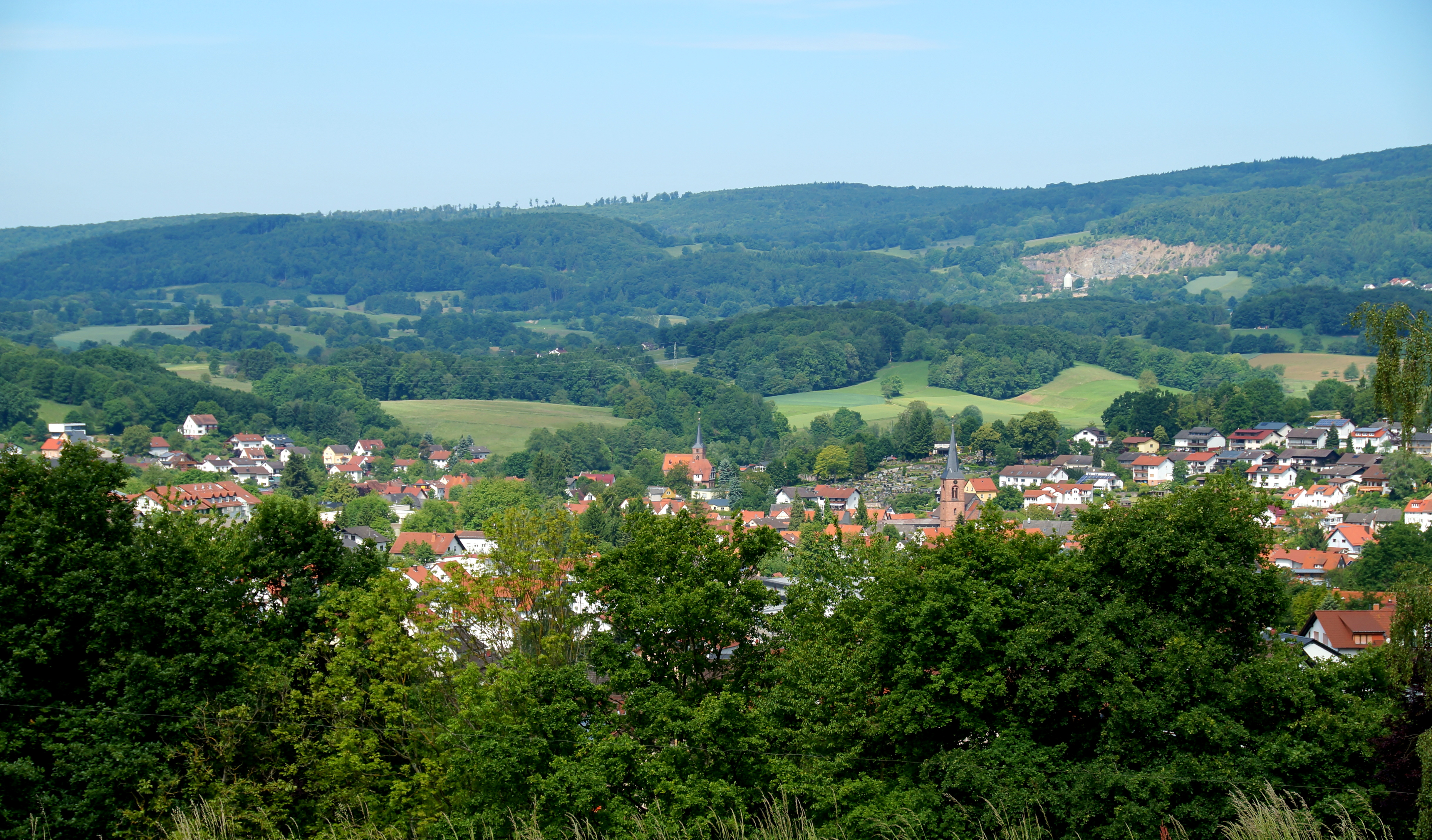 Fürth von der Anhöhe im Osten